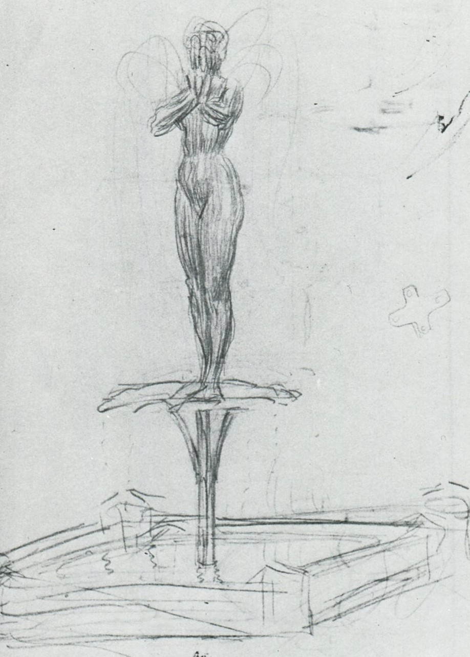 Studie i blyerts till skulpturen "Morgonbad"